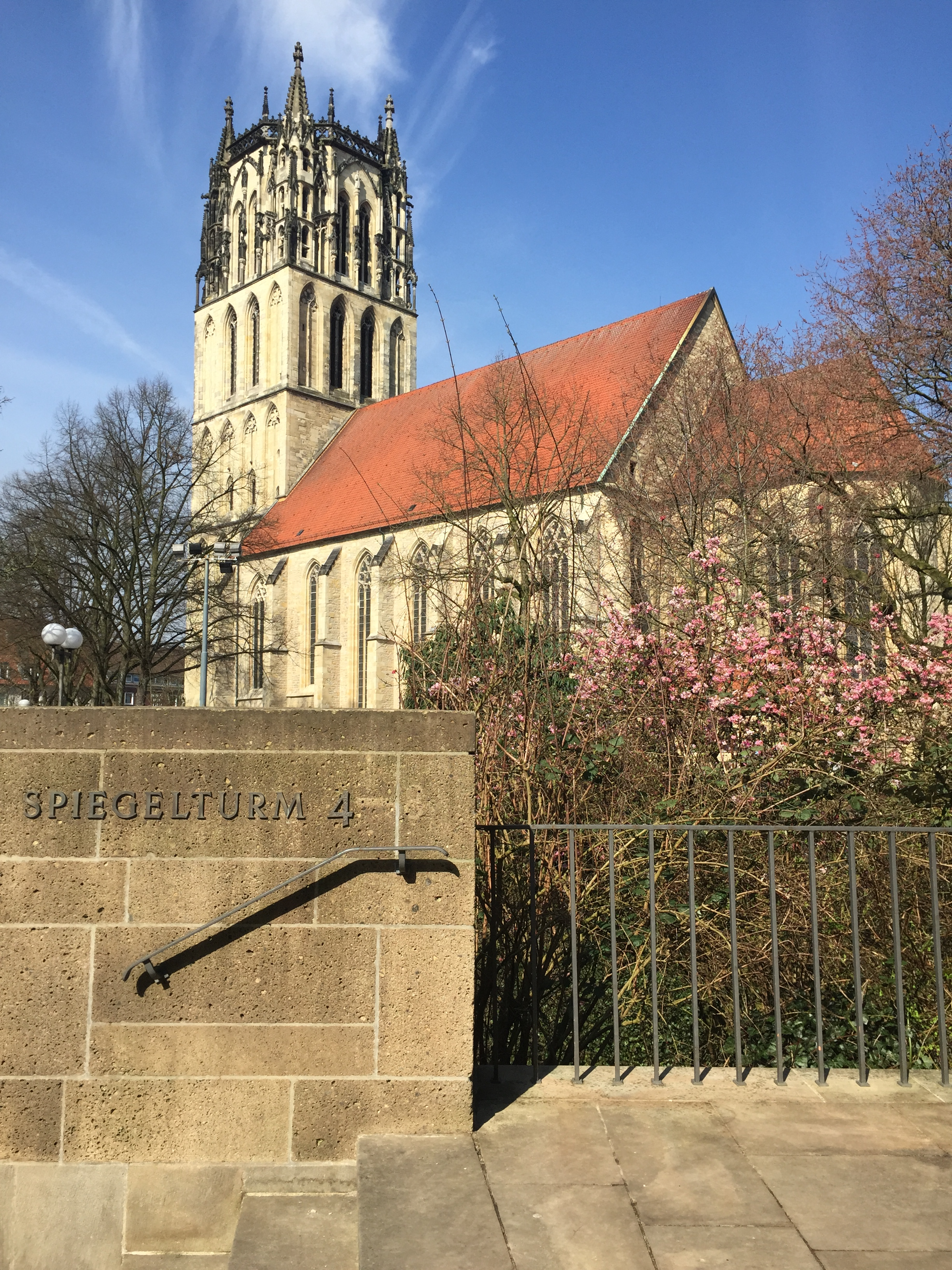 Kirche Liebfrauen-Überwasser (14. Jh.)This is a photograph of an architectural monument., no. 0